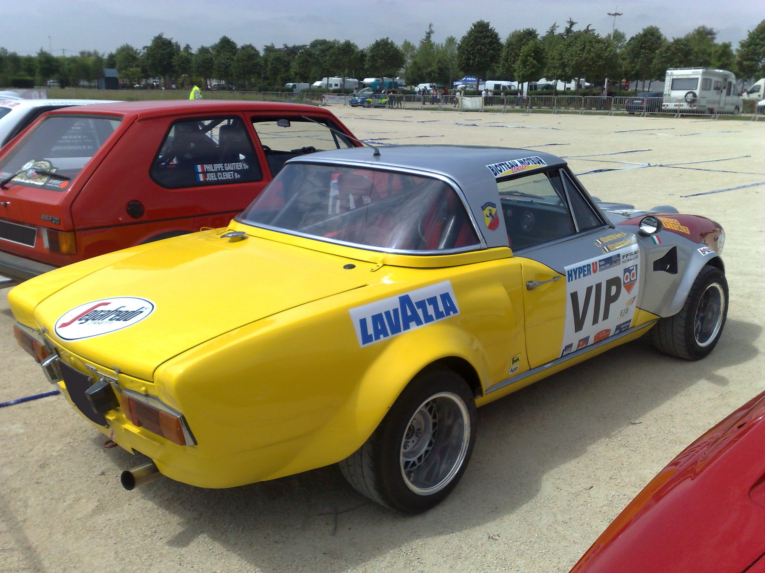 Fiat 124 Sport Rally.